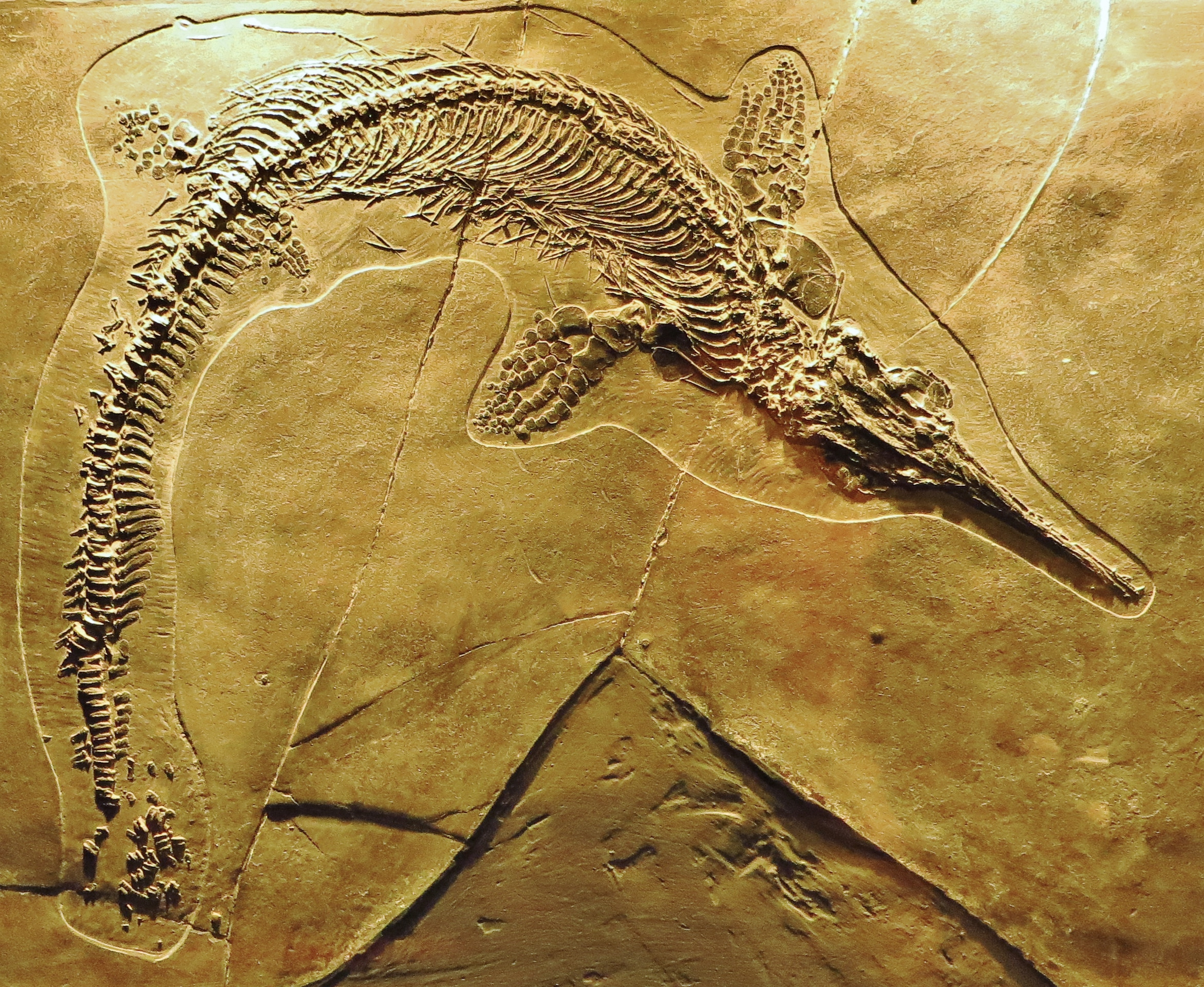 Fossil of Mixosaurus- Took the picture at Museo di Storia Naturale, Milano